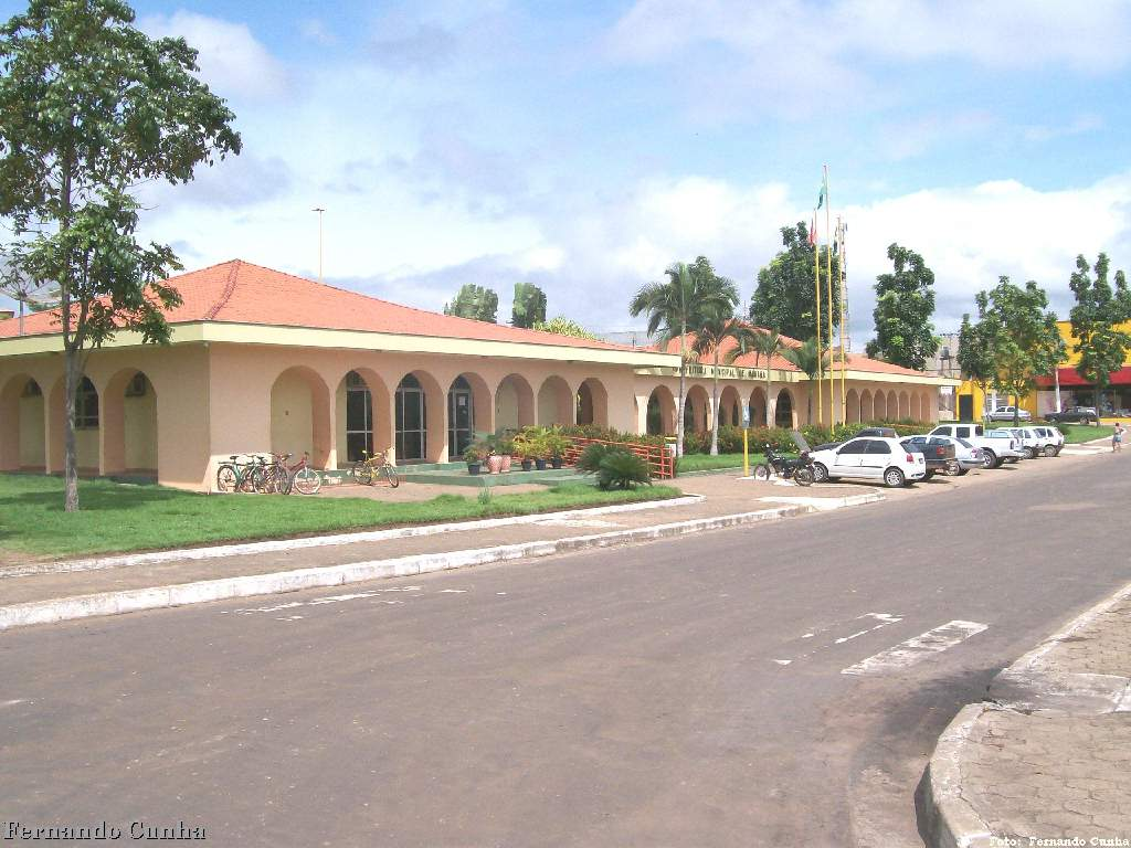 Prefeitura Municipal de Marabá Pará, Brasil.